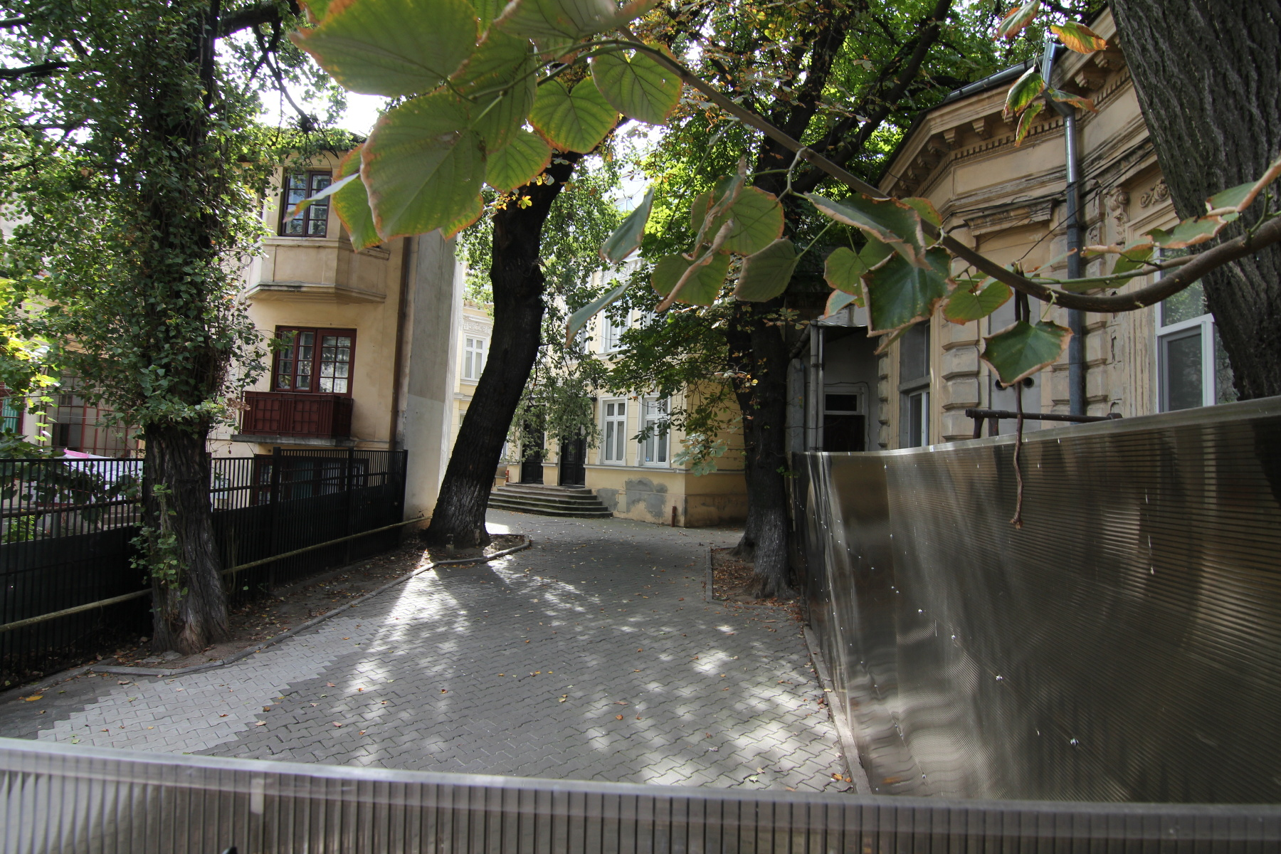 Casă pe Stelea Spătarul